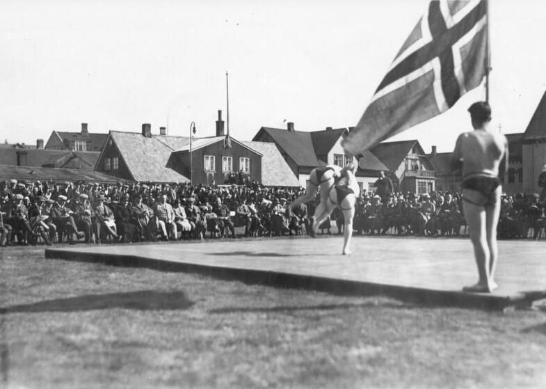 Polarfahrt mit dem Dampfer "München".- Isländische Ringkämpfe 17. Juli - 12. August 1925